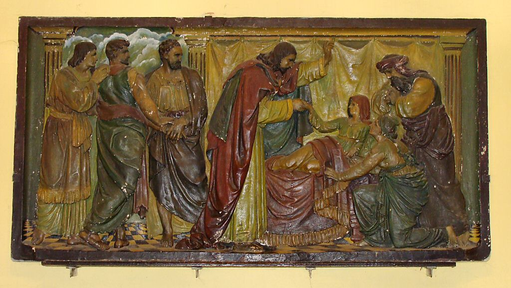 Szczecin - Kościół Garnizonowy Świętego Wojciecha na Placu Zwycięstwa - płaskorzeźba w kruchcie